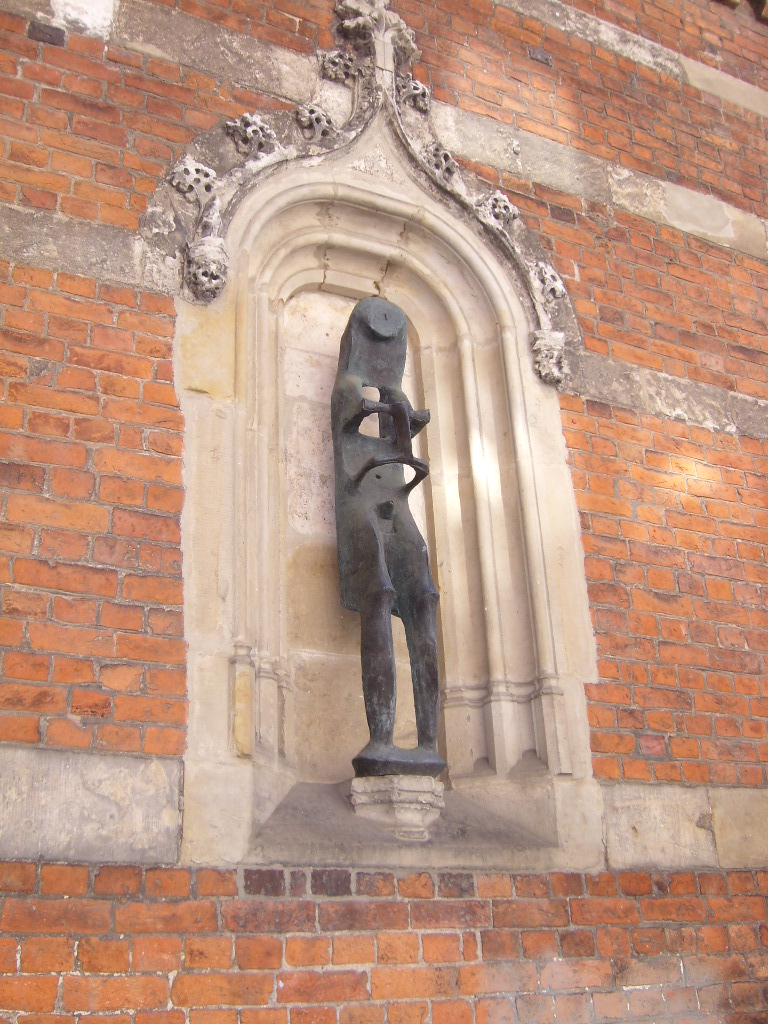 Skulptur Adam (2001/02) von Lothar Fischer am Eingang des St. Annen Museums